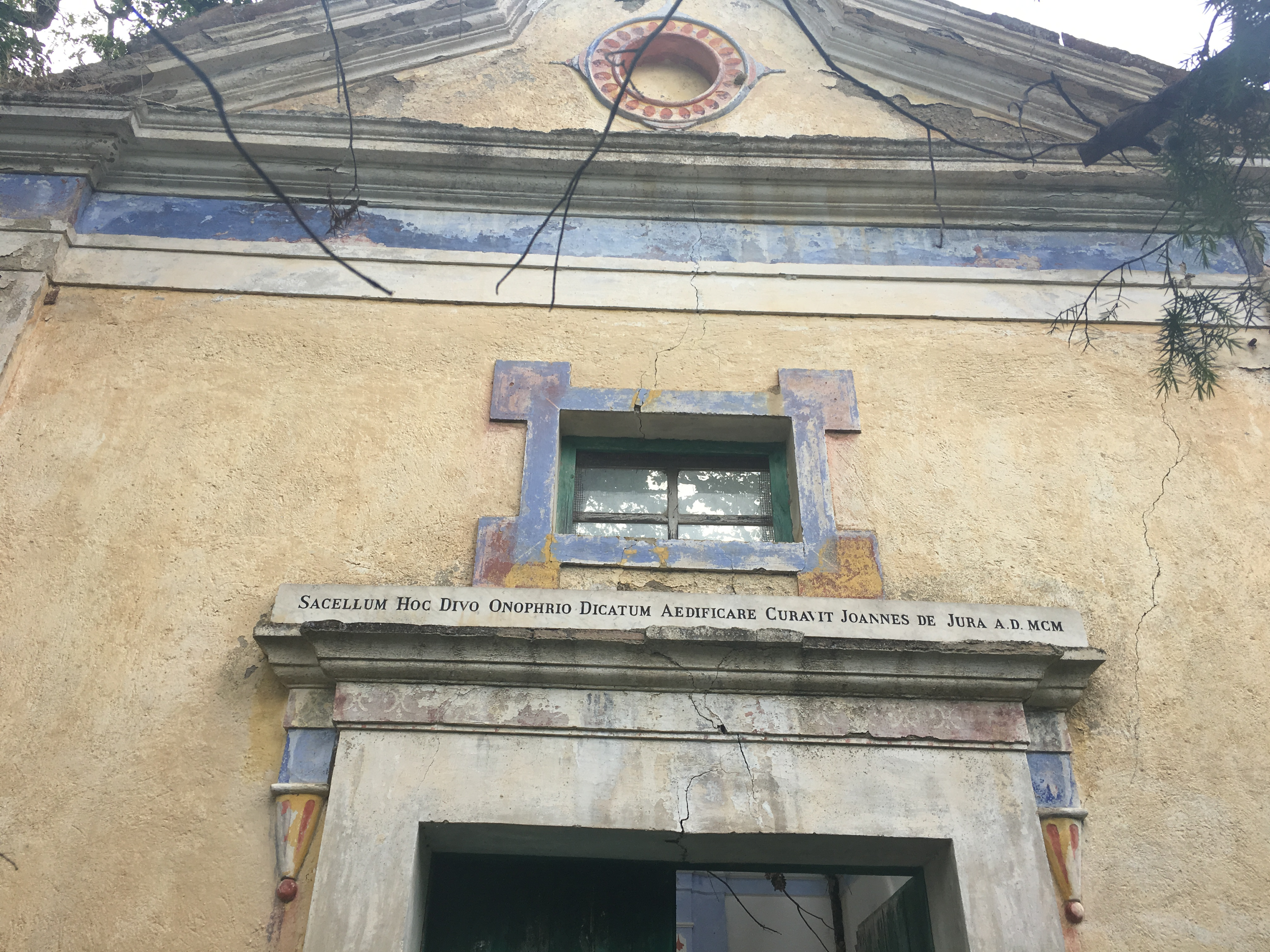 Iscrizione presente al di sopra della porta d'ingresso della Cappella di Sant'Onofrio. "Sacellum hoc divo Onophrio dicatum aedificare curavit Joannes de Jura A.D. MCM " "In questo luogo Joannes de Jura si occupò di costruire il tempietto dedicato a Sant'Onofrio nel 1900 D.C."